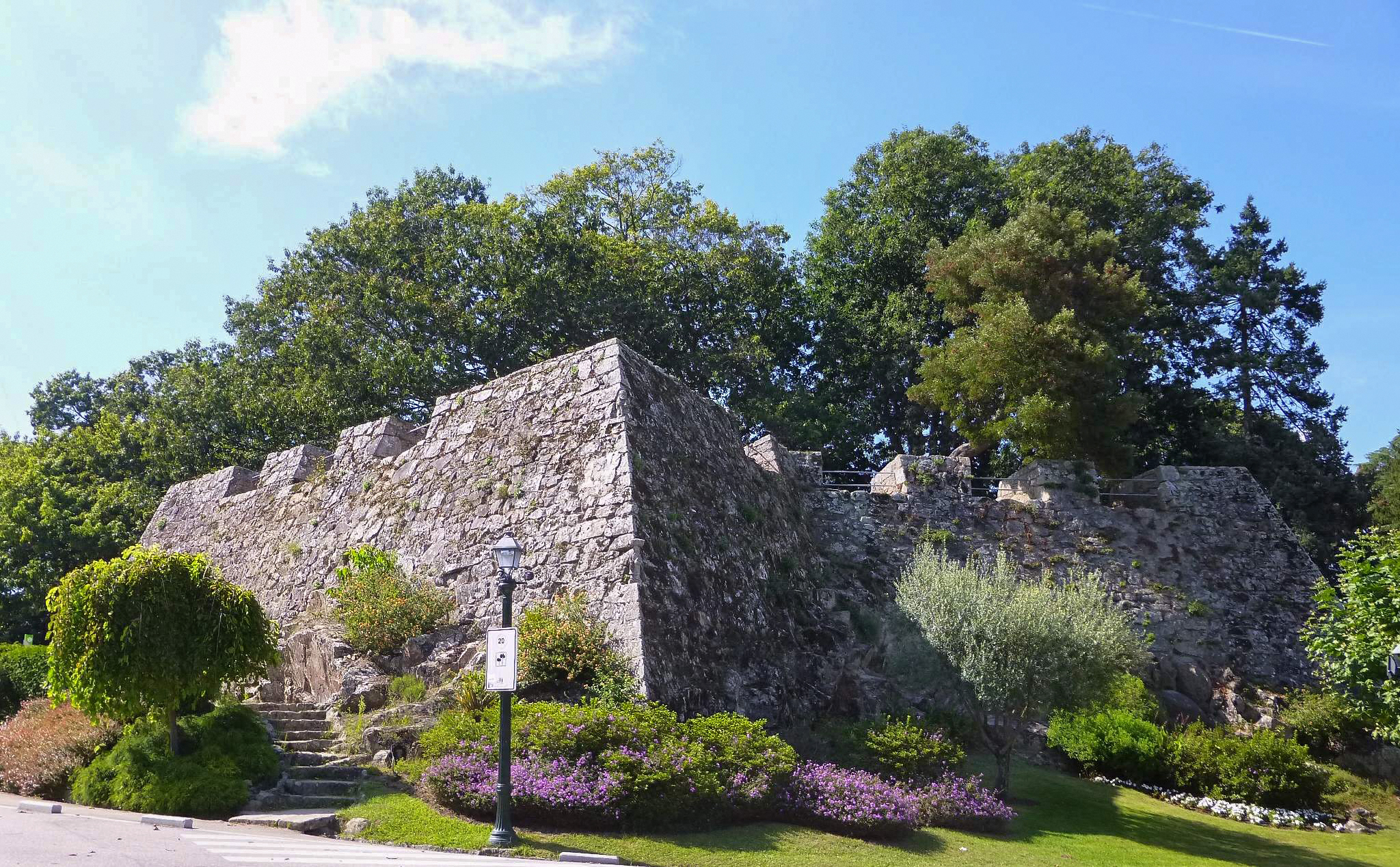 Vigo - Parque do Castro, Fortaleza do Castro